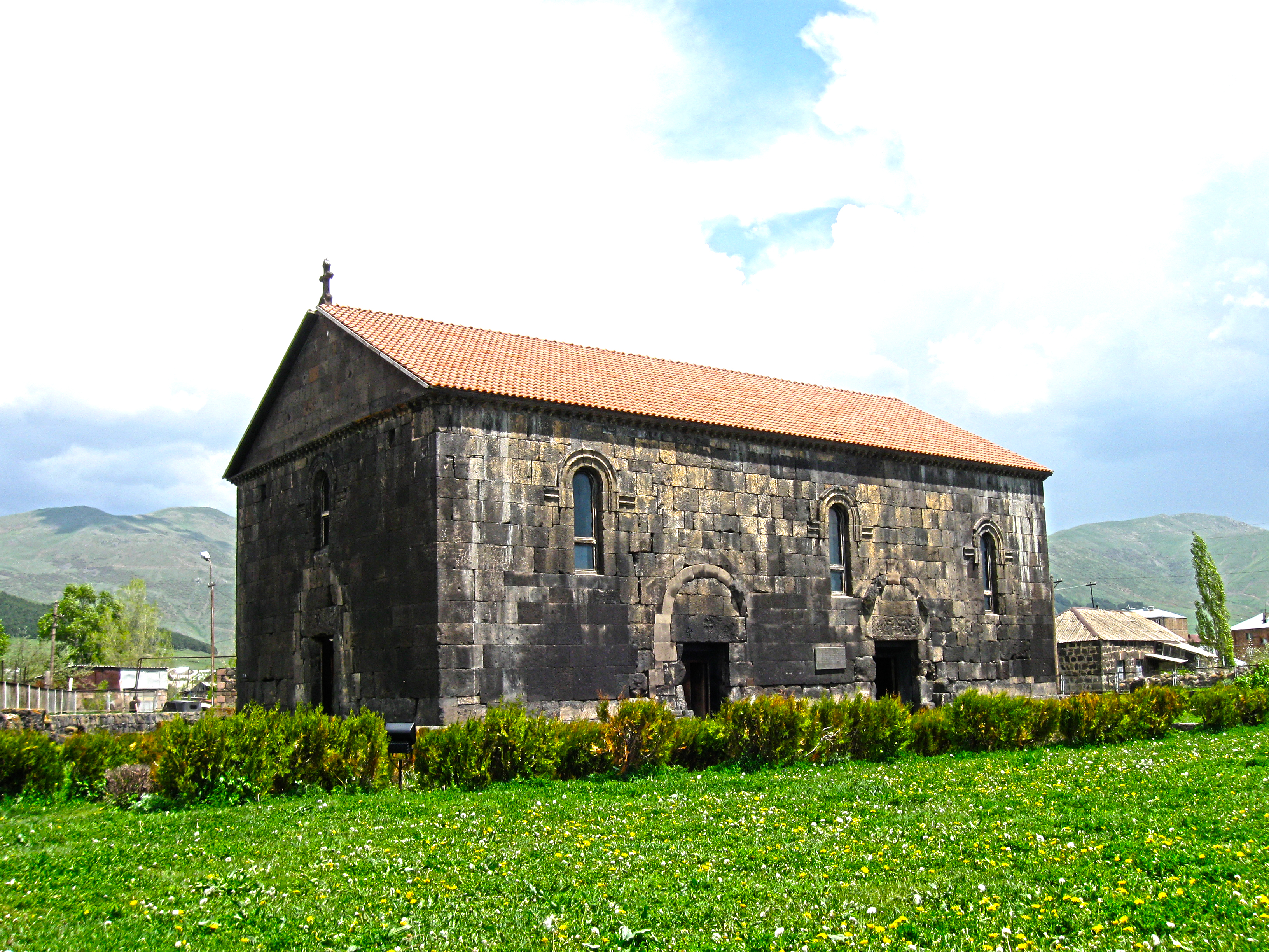 Ապարանի Սուրբ Խաչ